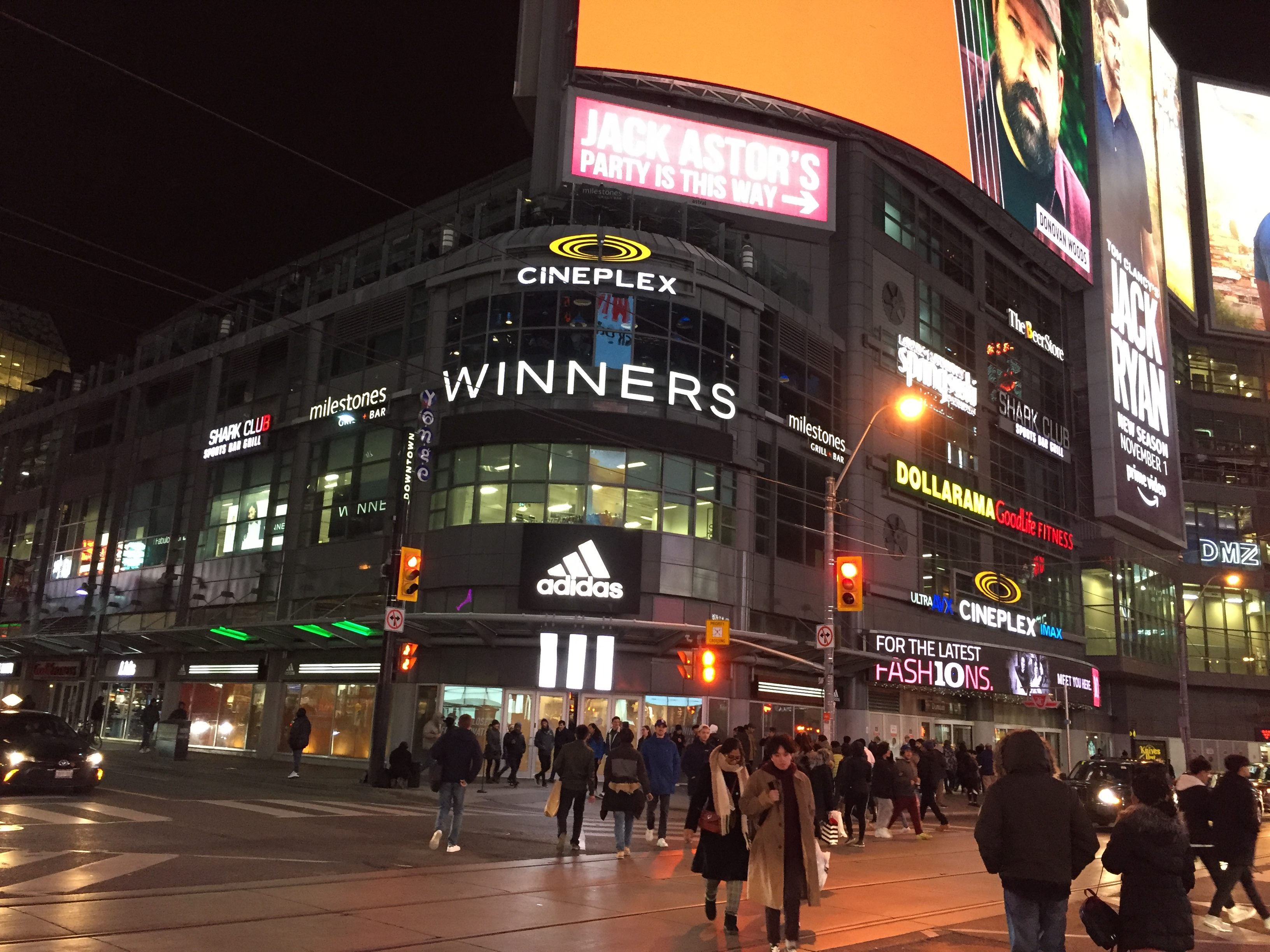 کوردی: وینەرس